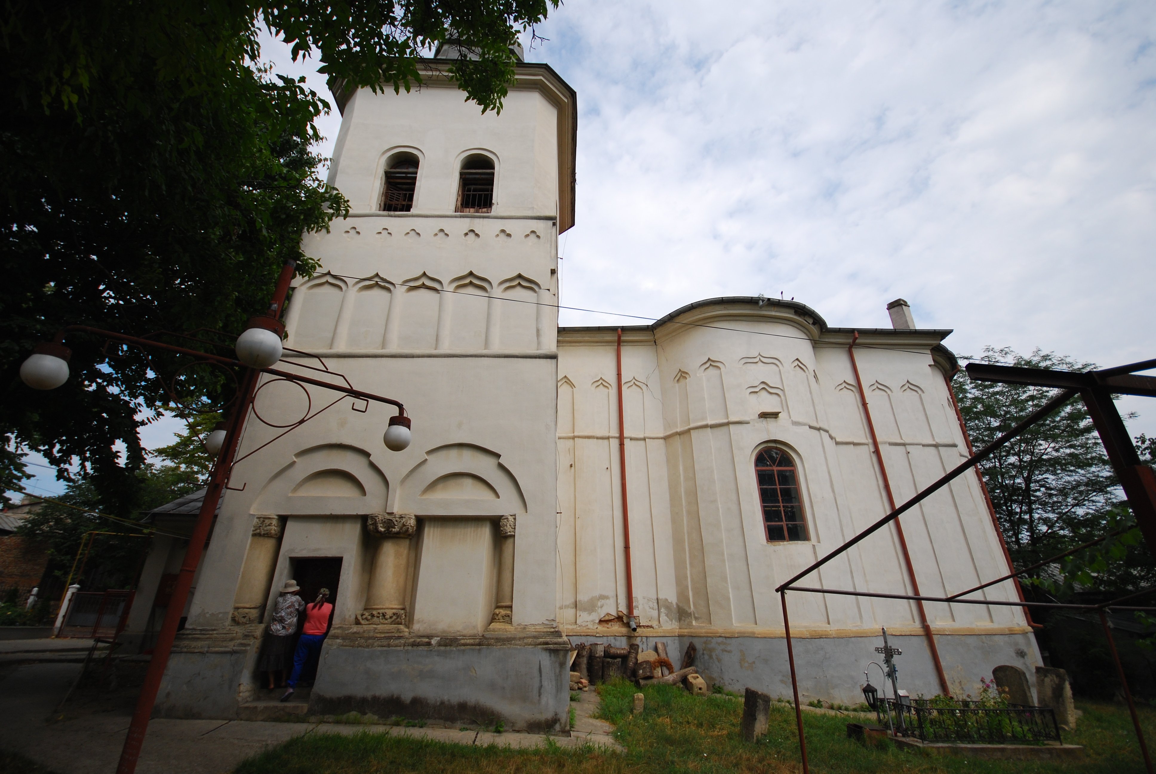 Biserica "Pogorârea Sf. Duh" - Curelari